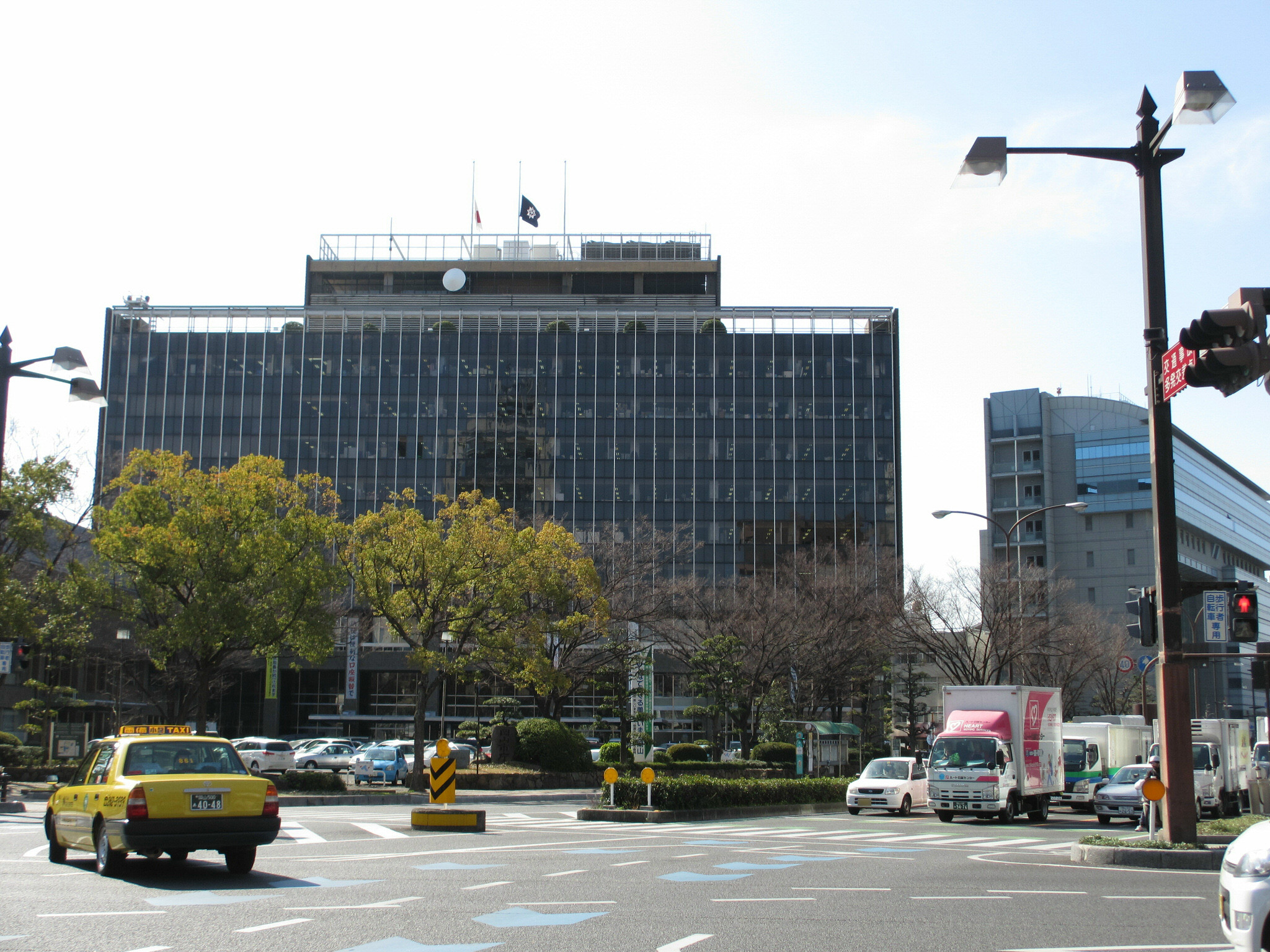 Okayama City Hall